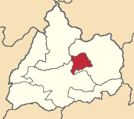 Mapa localizador del cantón en Cotopaxi, Ecuador